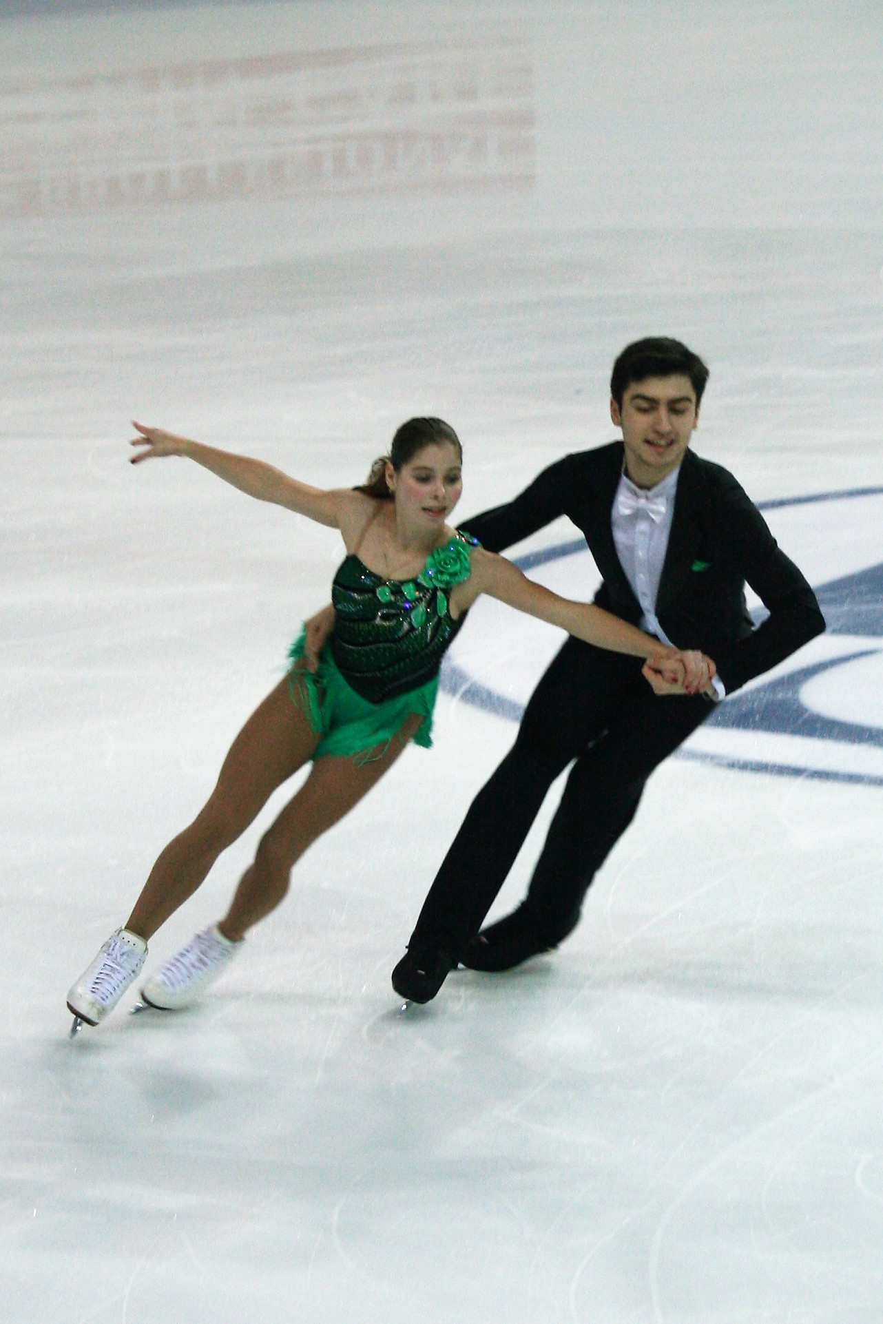 Анастасия Мишина / Владислав Мирзоев (Россия) на финале Гран-при по фигурному катанию среди юниоров 2016-2017